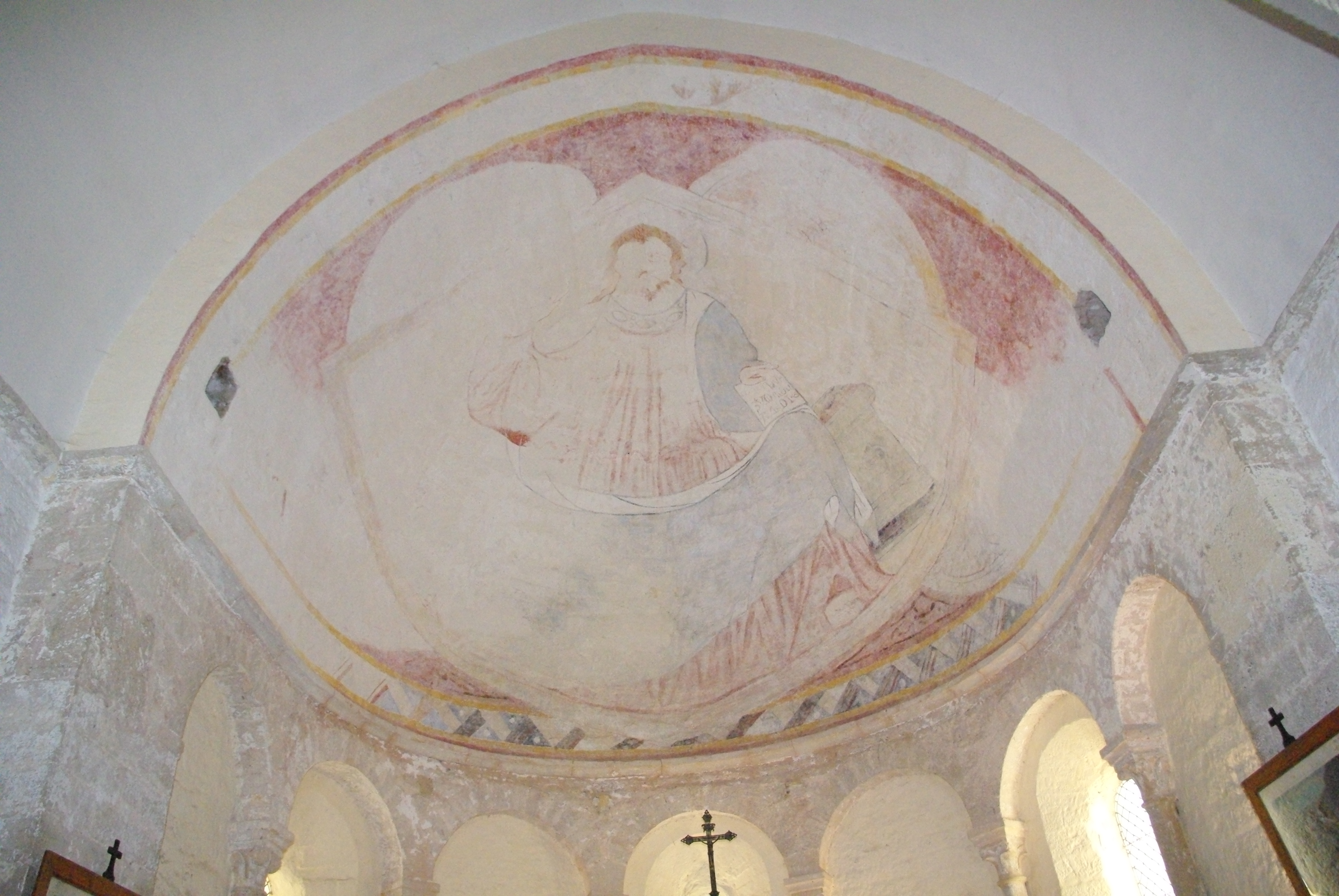 Chœur de l'Église de Bissy-la-Mâconnaise